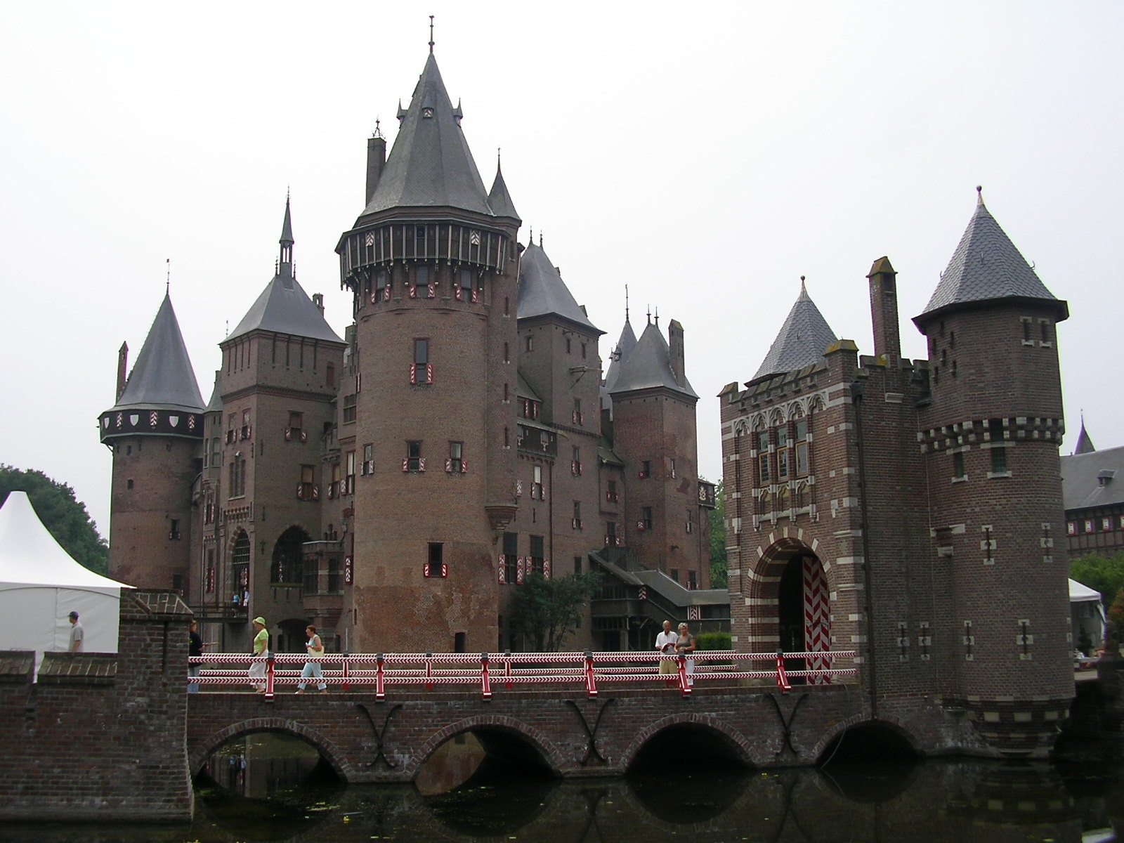 Kasteel De Haar 22 juli 2006 Gemaakt door wikipedia vrijwilliger gijsevers